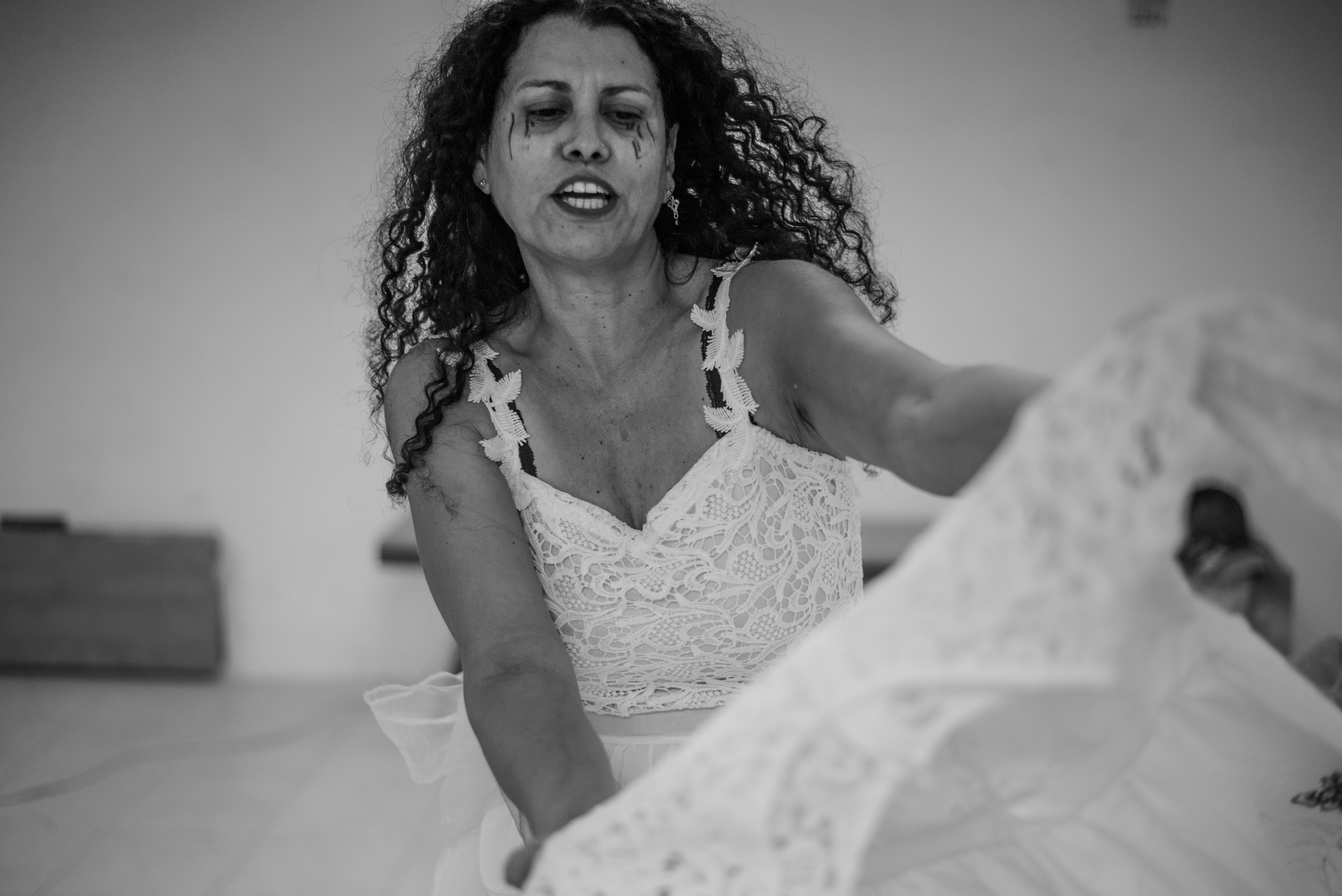 פזית נוני בהצגה מחפשת